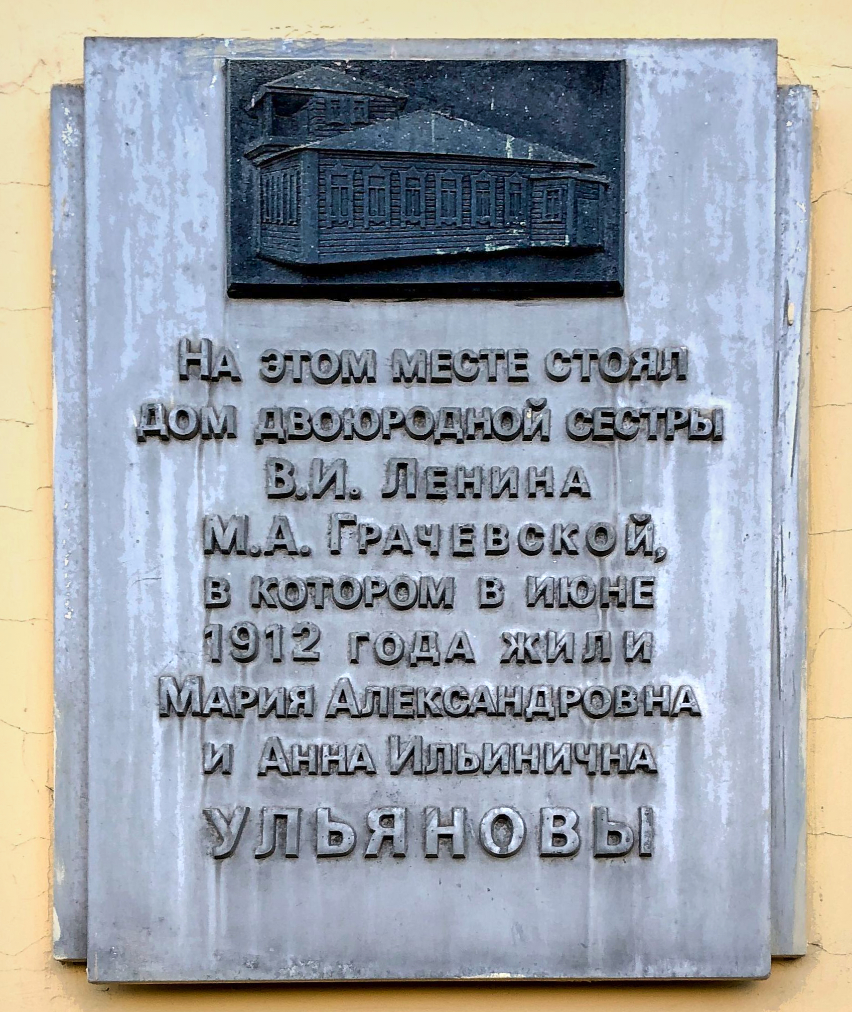 Памятная табличка на здании завода Аксион в Ижевске